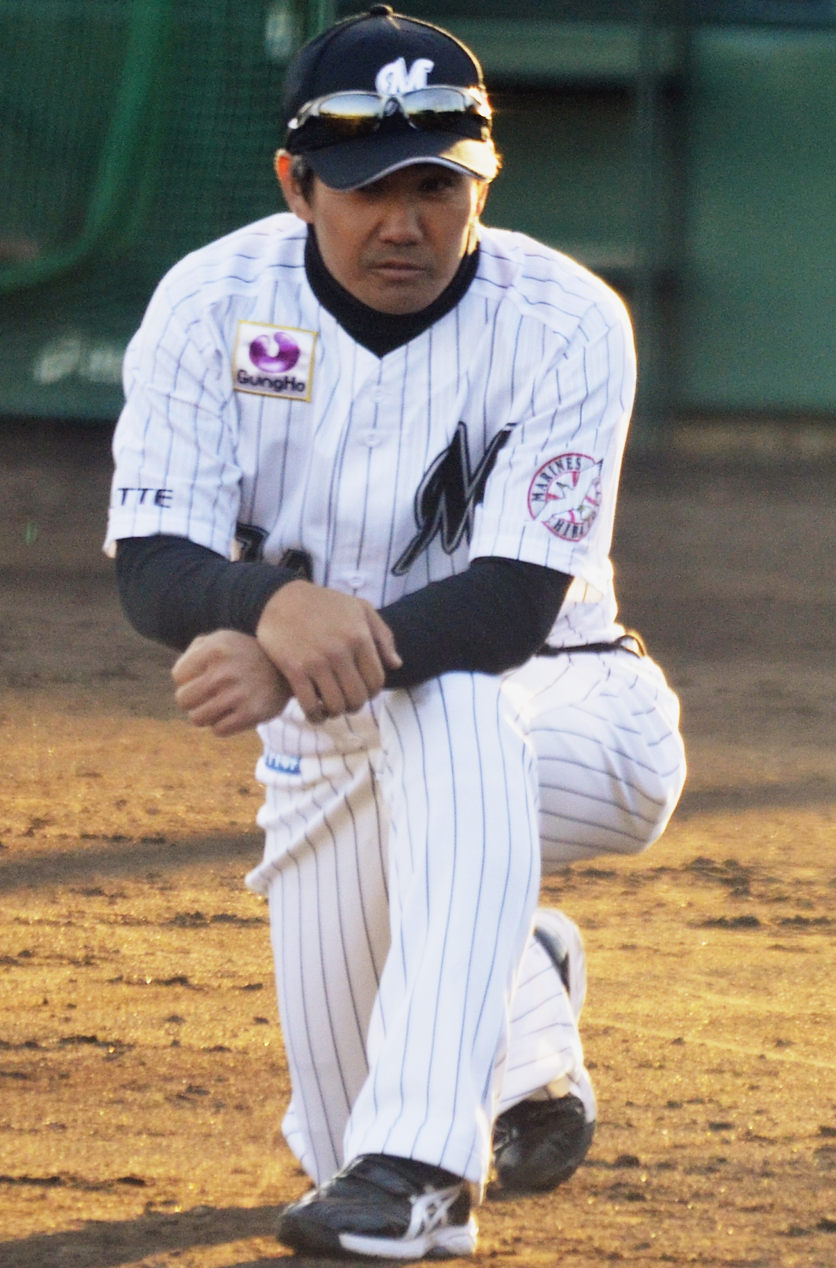 千葉ロッテマリーンズの小坂誠コーチ